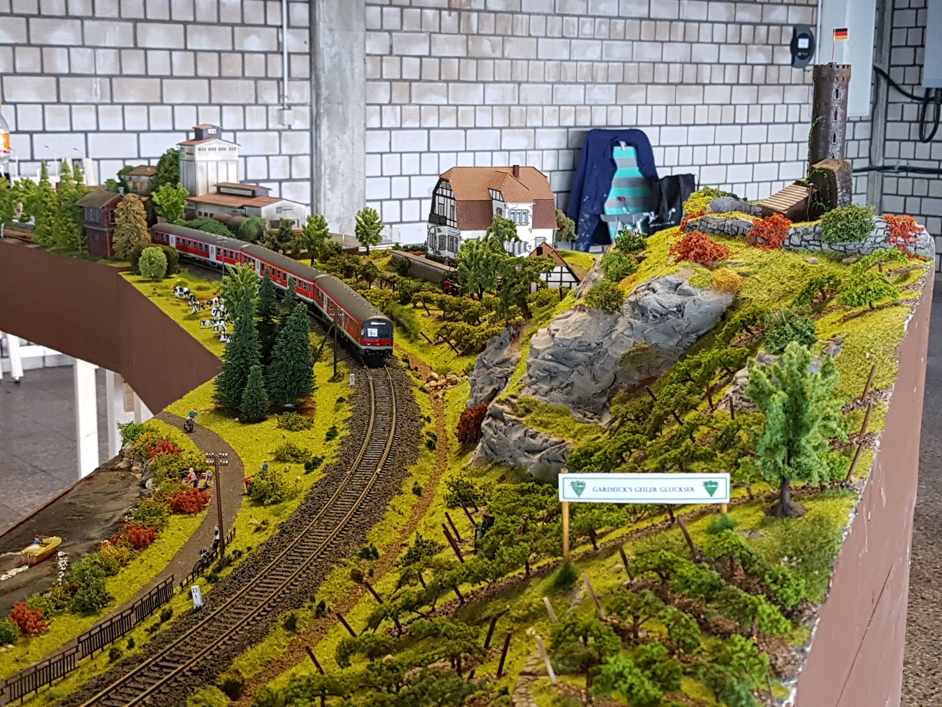 Am 25. August 2018 wurden alle Module der EAKJ-Modellbahn-Modulanlage probeweise aufgebaut. Hintergrund war die bevorstehende Modellbahnausstellung in Linnich-Tetz am 7. Oktober 2018. Das Foto zeigt mehrere der Module in bereits zusammengeschraubten und aufgebockten Zustand.